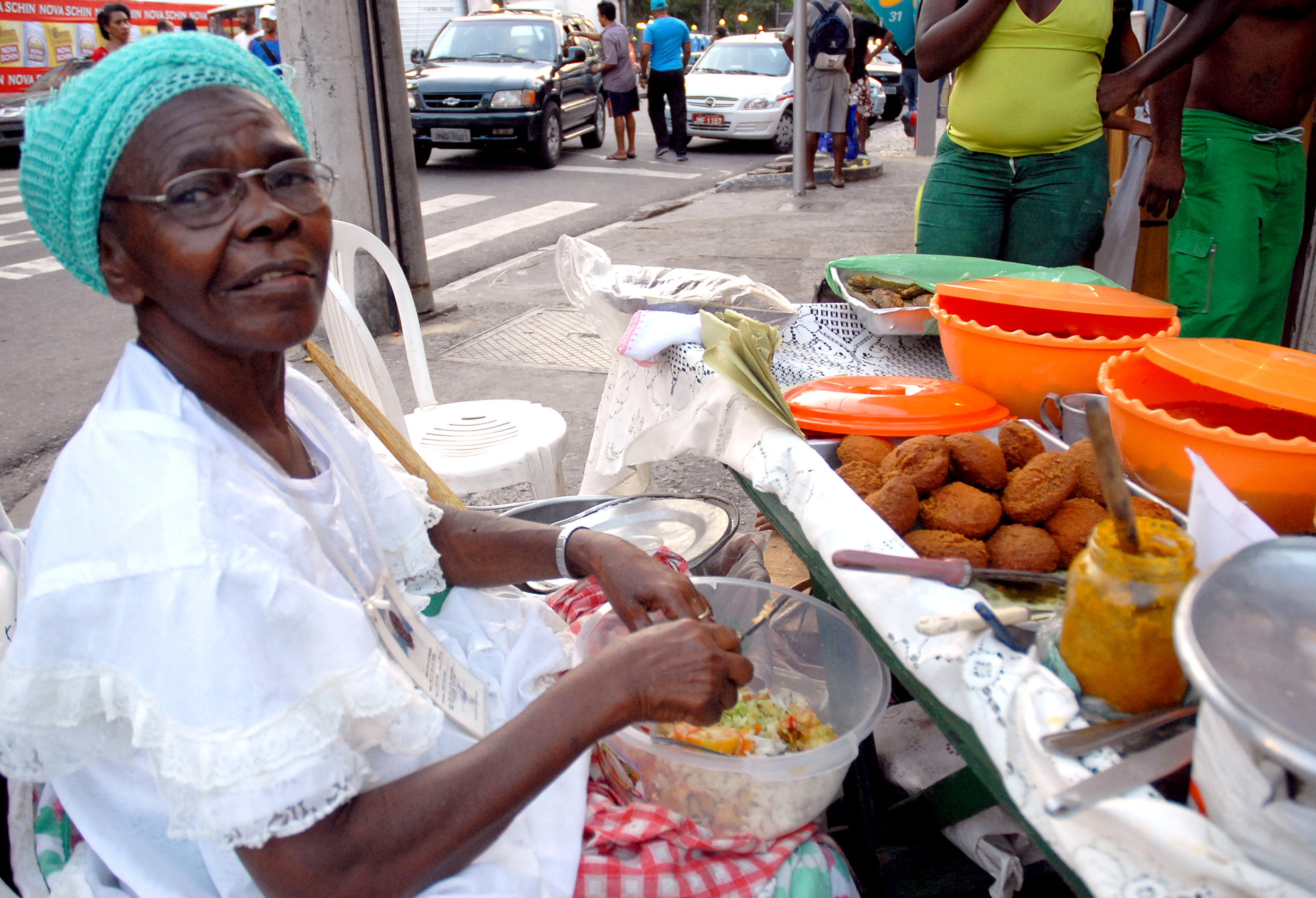 Salvador (BA) - A baiana Anelita Conceição Viana, vendedora de acarajé.